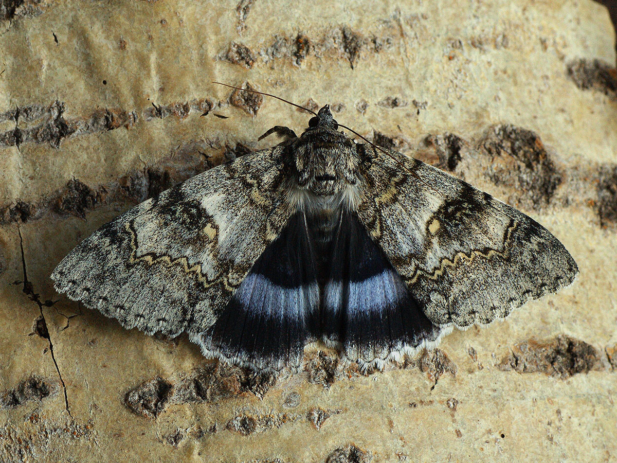 Exemplar found: Russia, Moscow Oblast, Orekhovo-Zuyevsky District, near settlement Topoliny, 23.08.2016, ex pupa МО, Орехово-Зуевский р-н, окрестности посёлка Тополиный, 23.08.2016, из куколки